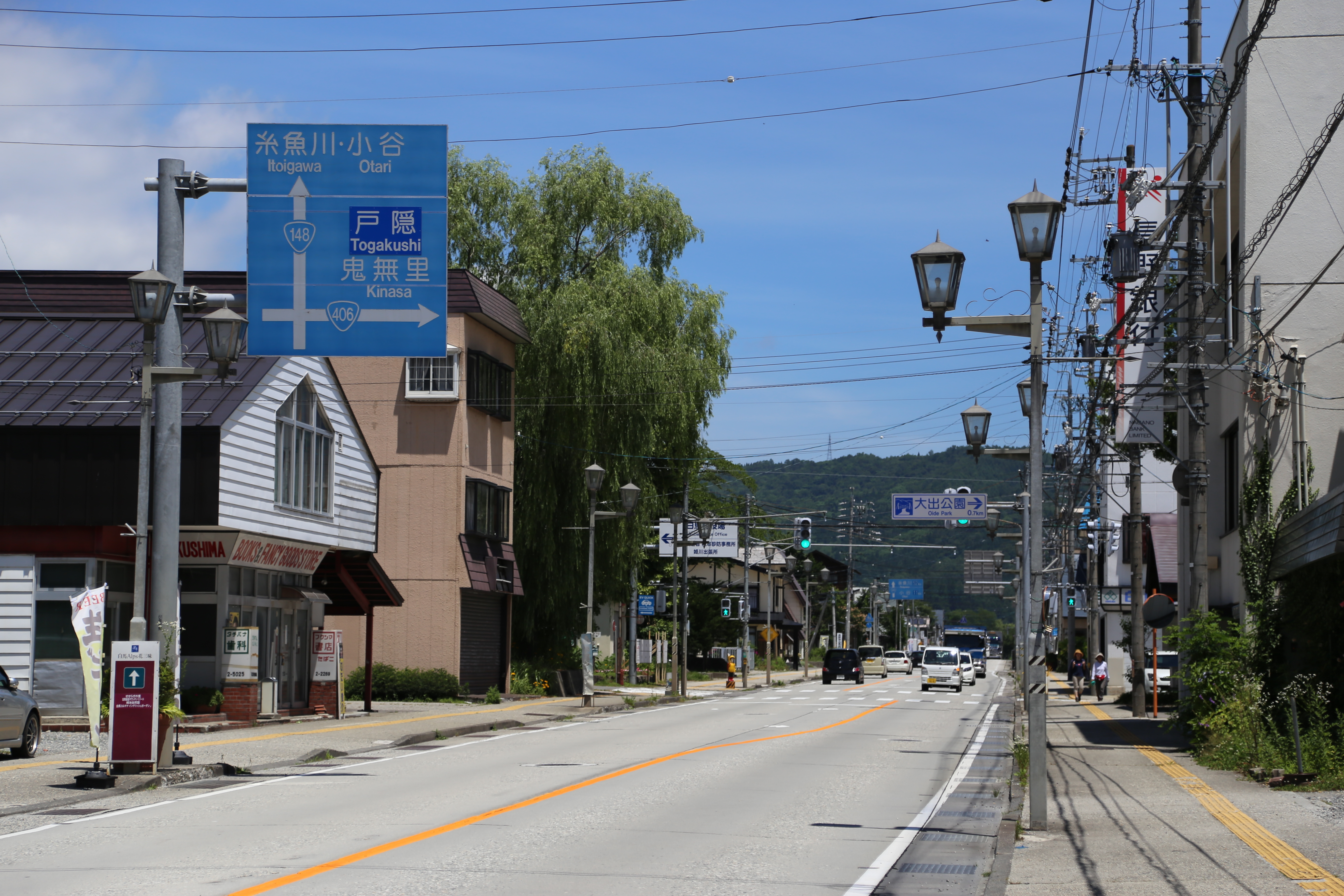 国道148号と国道406号との交差点（遠景）